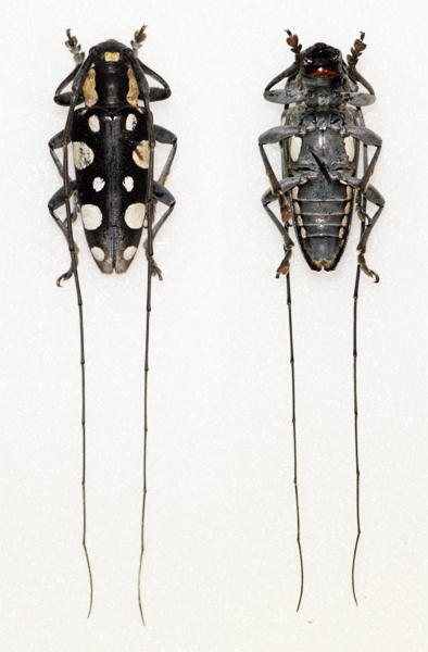 Castelnau,1840 Sex: Male Data: 02-2012 - Morsmanga Forest - Madagascar Size: ?